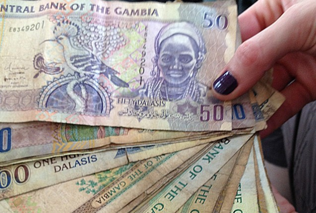 Billetes de Dalasis en Gambia